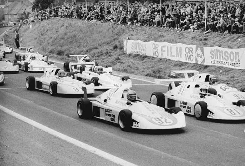 21. Frohburger Dreieckrennen, Rennfeld ADN-ZB Gahlbeck 28.9.81 Bez. Leipzig: 21. Frohburger Dreieckrennen- Start zum letzten Saison-Wertungslauf der DDR-Meisterschaften der Rennwagen B 8 bis 1300 ccm, Leistungsklasse 1. Auf dem 5,8 km langen Rundkurs sahen 25.000 Zuschauer am 27.9.81 spannende Kämpfe der Automobilsportler. Vorn links (Nr. 92) der Sieger und neue Titelträger Frieder Kramer (MC Zwickau). Rechts daneben der Zweitplazierte Ulli Melkus (MC Post Dresden-Nr. 81).